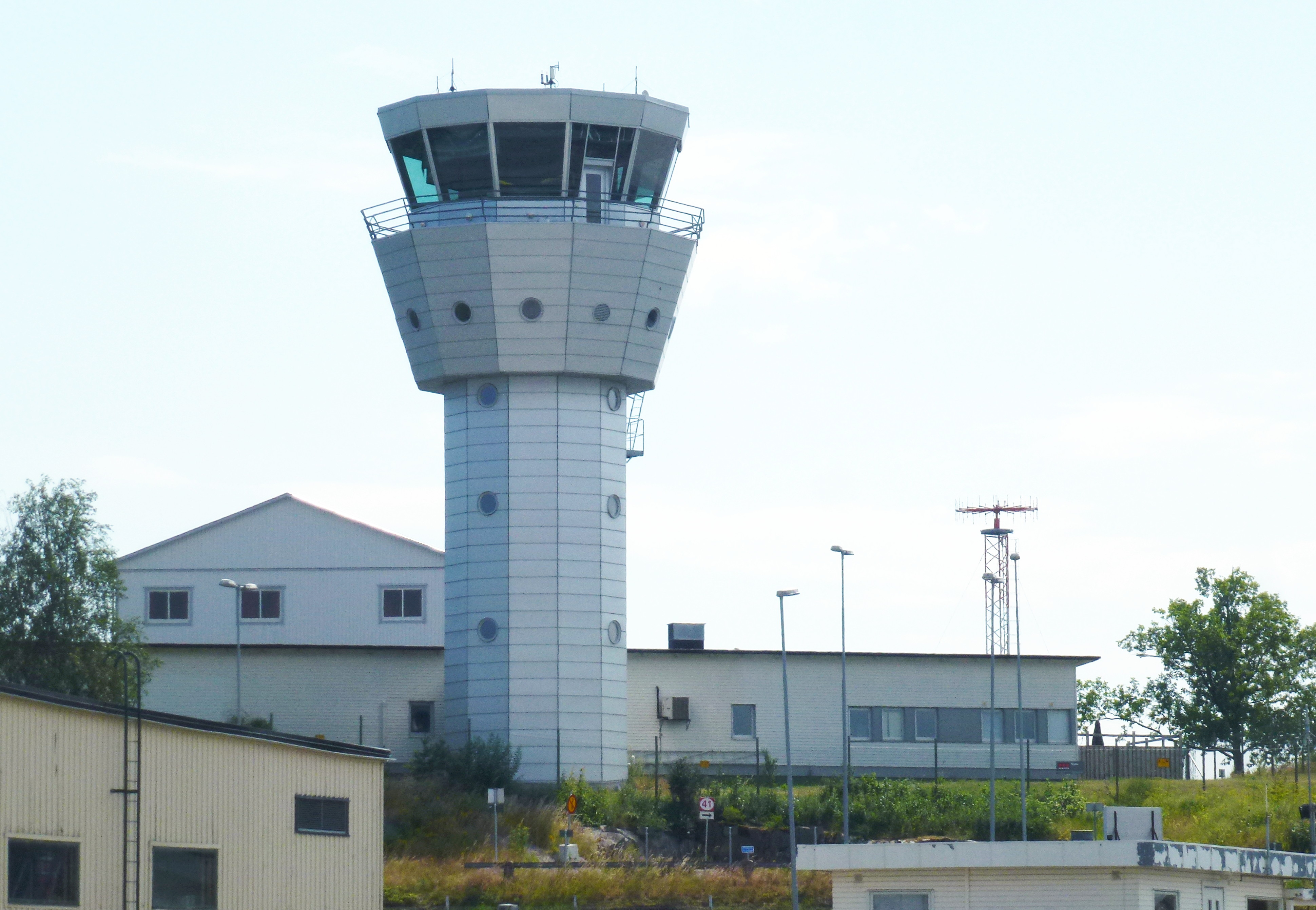 Bromma flygledartornet